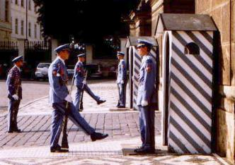 Wisseling van de wacht bij het Paleis in Praag. De foto is gemaakt in de zomer van nl:2003 door Gebruiker:SanderSpek